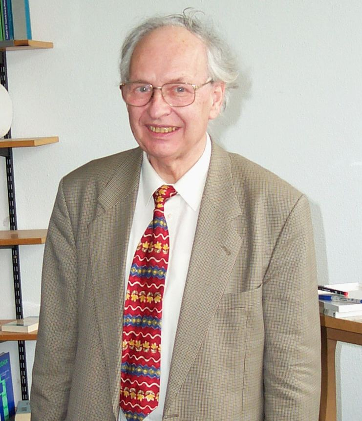 Reinhard Selten, visit at the CJD Christophorusschule Königswinter